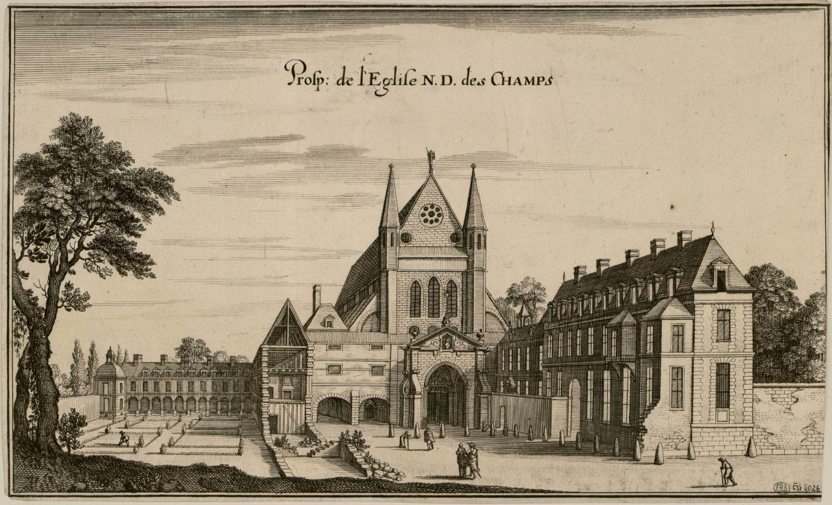 Le monastère des carmélites de Notre-Dame-des-Champs au milieu du XVIIè siècle